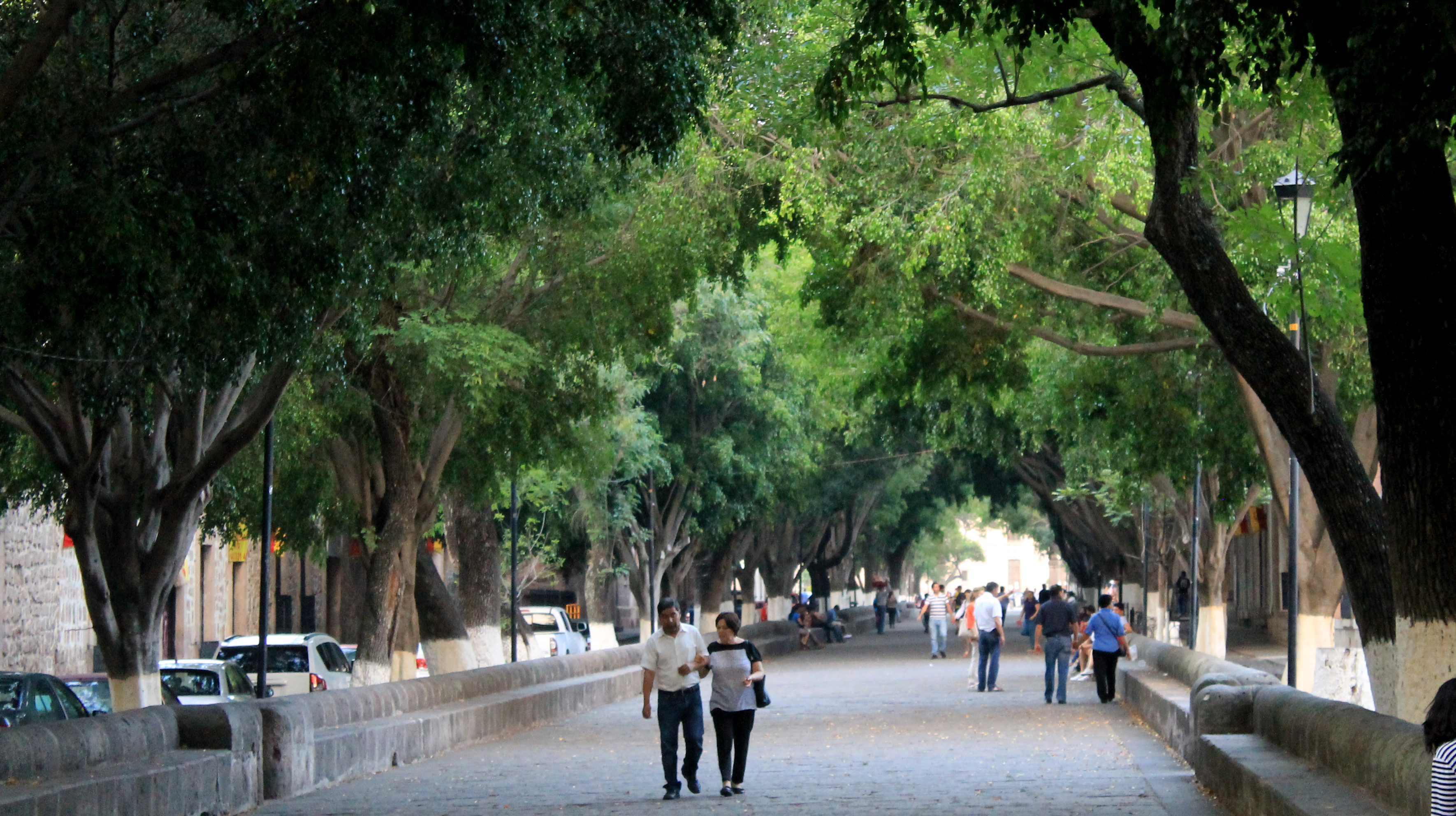 Calzada